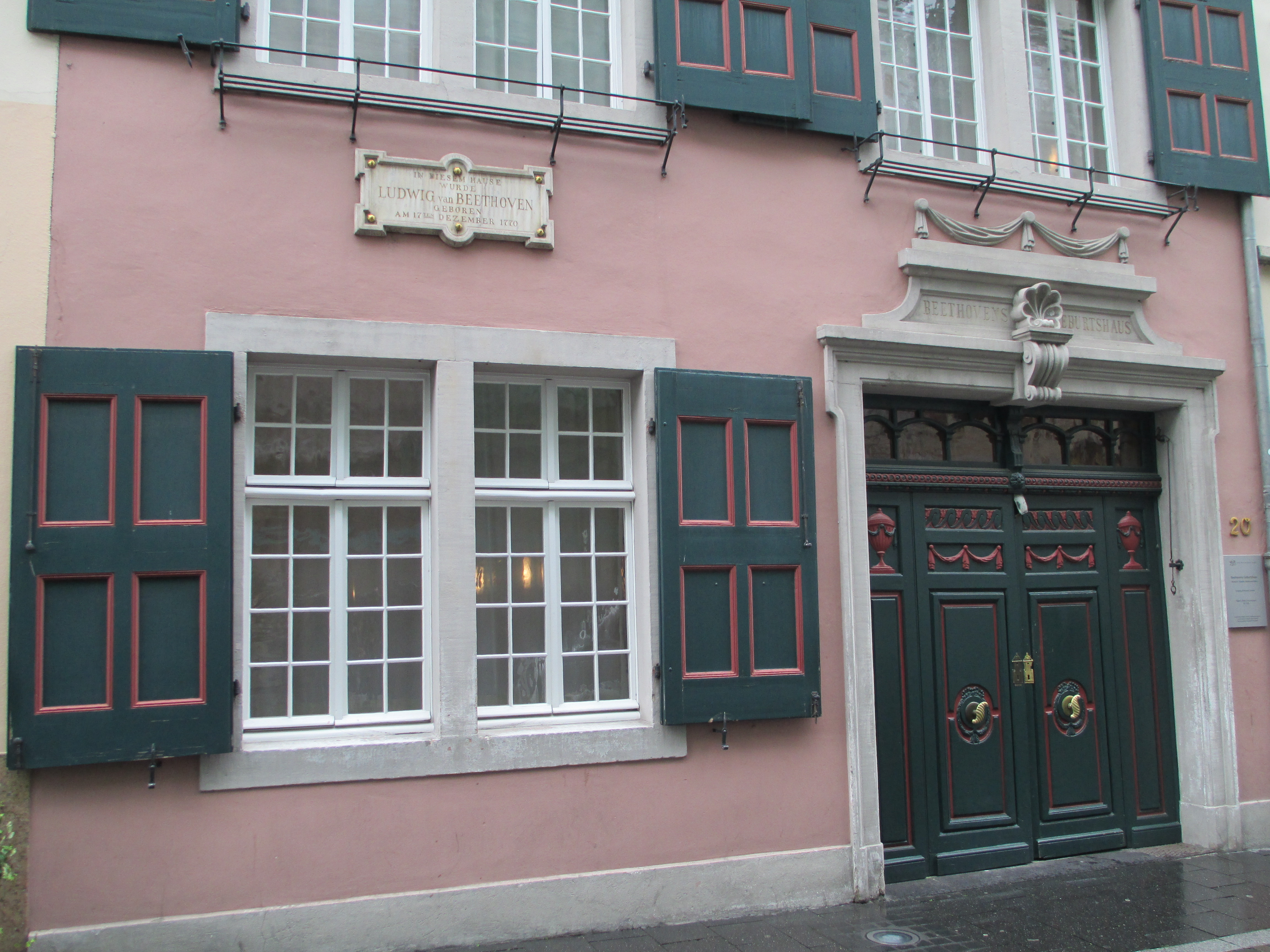 בית בטהובן בבון